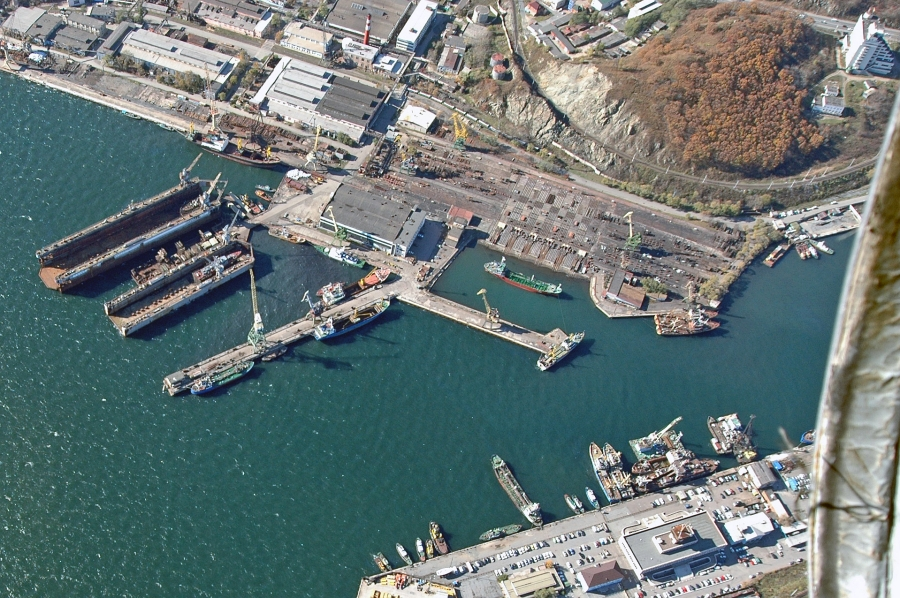 Находкинский Судостроительный Завод, вид с вертолёта